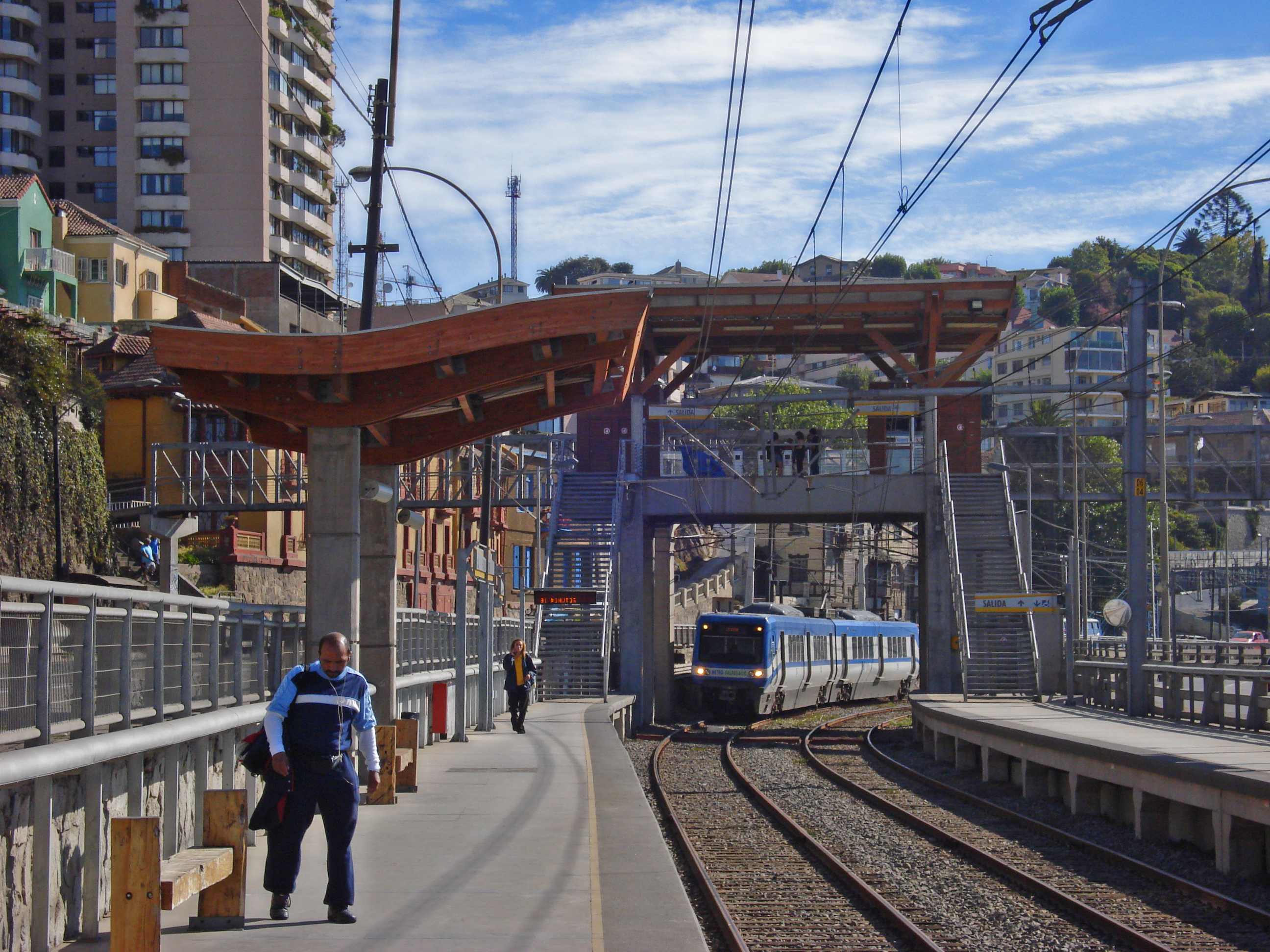 Recreo estacion.jpg